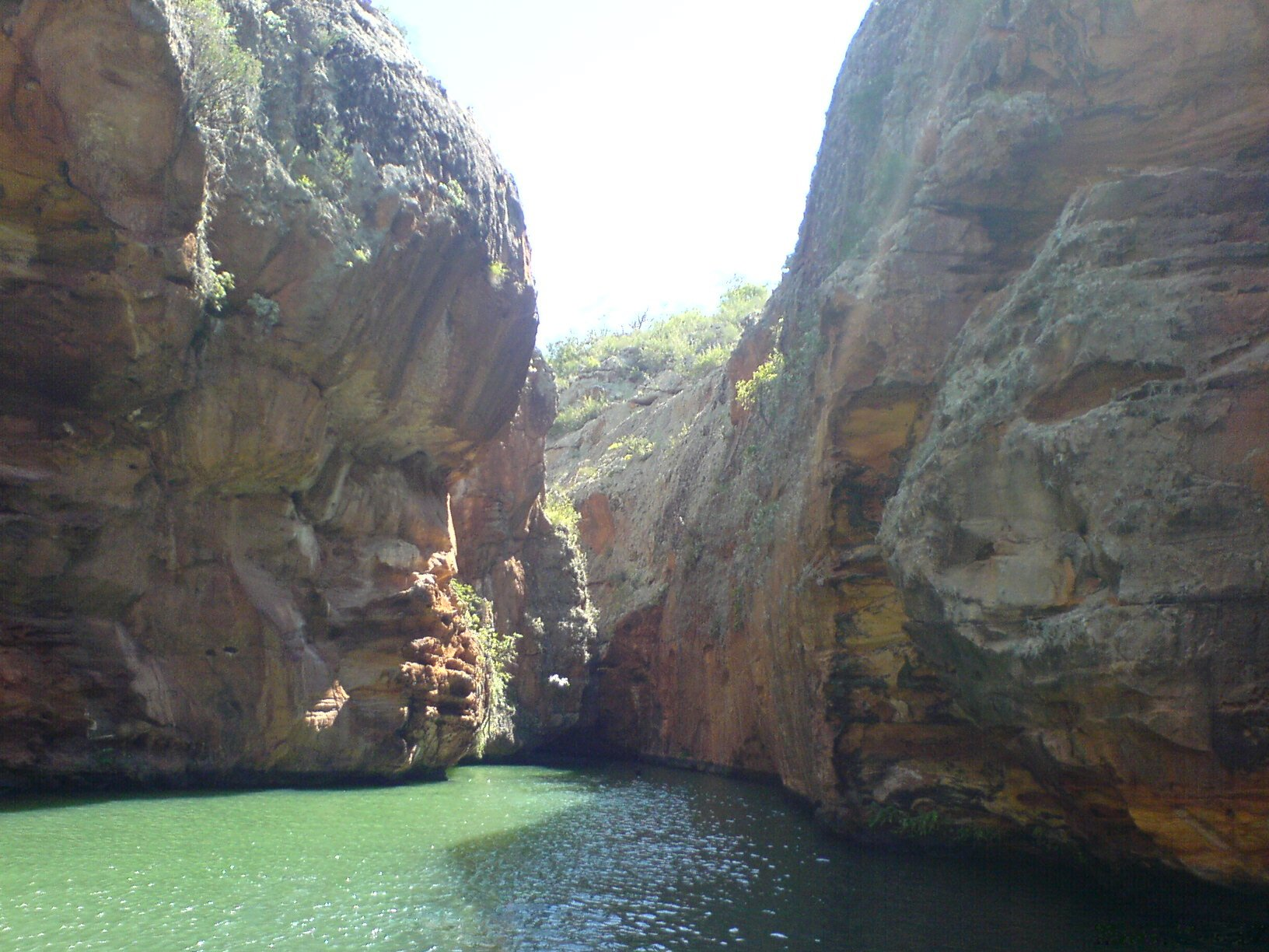 São Fracisco River canyon, Brazil